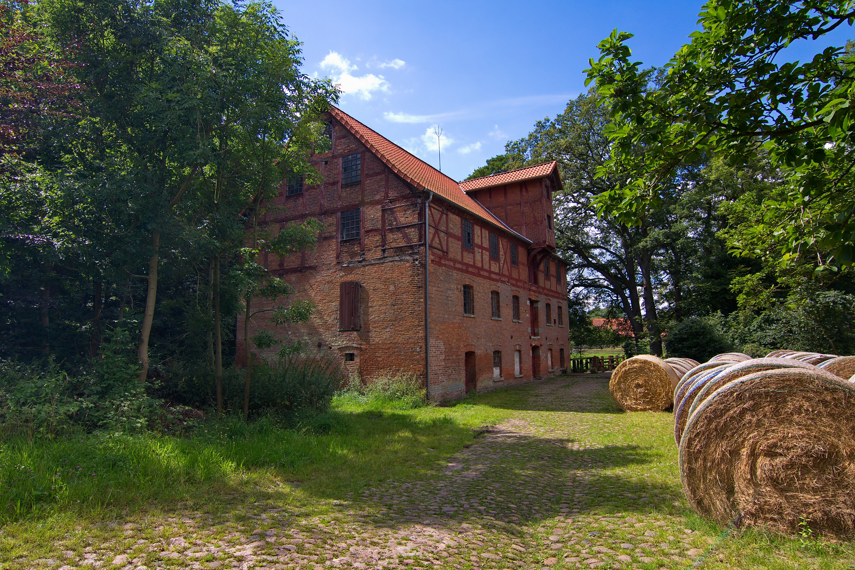 Die Eitzer Wassermühle findet im Jahr 1220 erste urkundliche Erwähnung. Der Gewerbebetrieb Eitzer Mühle bestand bis zum 30. Juni 1968.